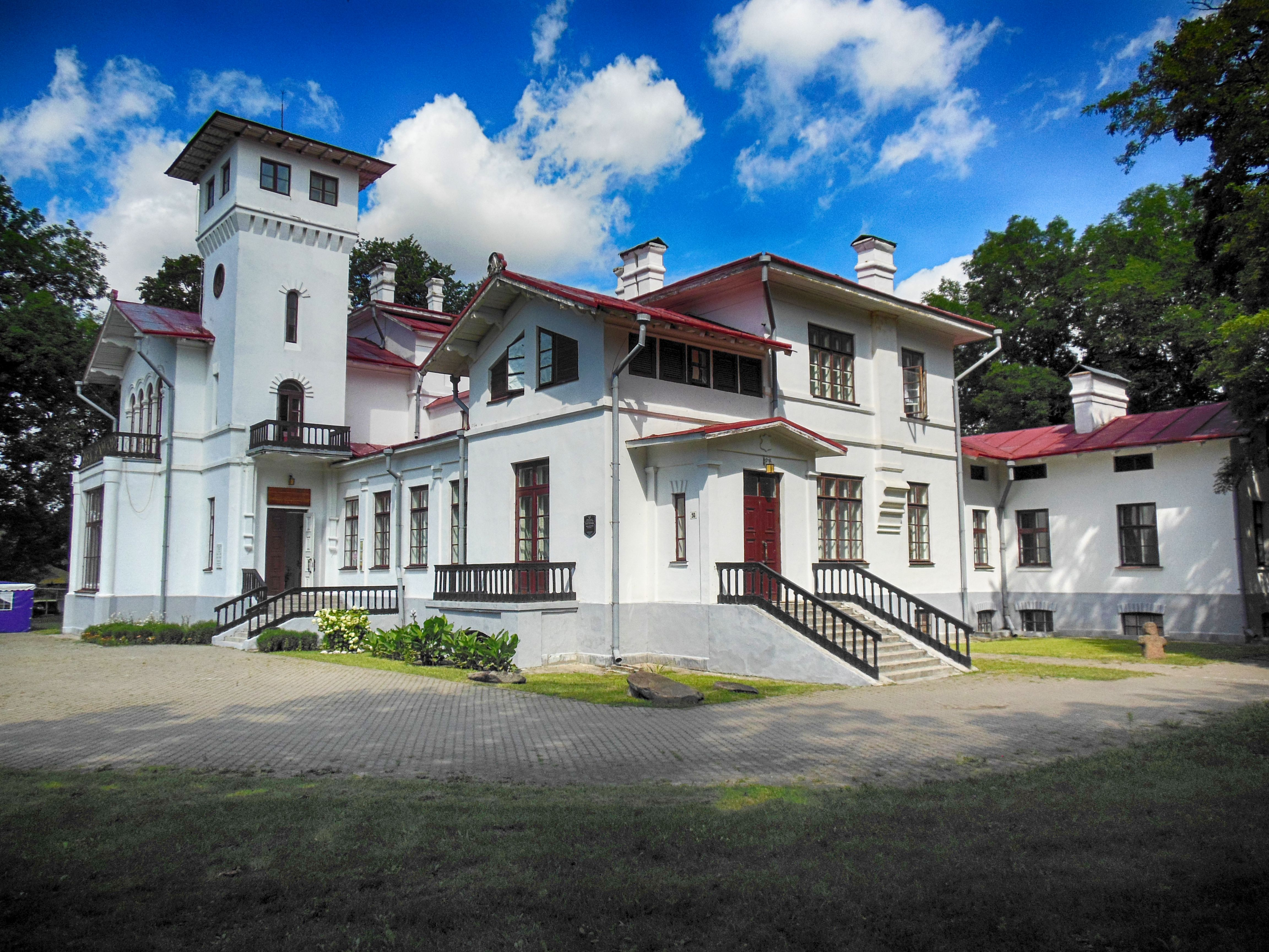 Беларуская (тарашкевіца): Будынкі былой гарадзкой сядзібы: сядзібны дом, флігель. г. Пружаны This is a photo of Belarusian heritage monument. Reference number: 112Г000585 ( WLM)